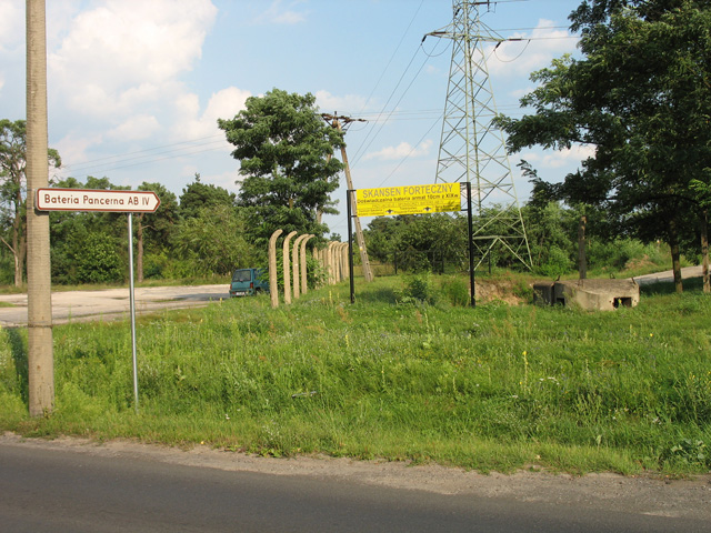 Skansen Fortyfikacji Pancernej Twierdzy Toruń. Brama Skansenu i punkt obserwacyjno-bojowy SPS-2m